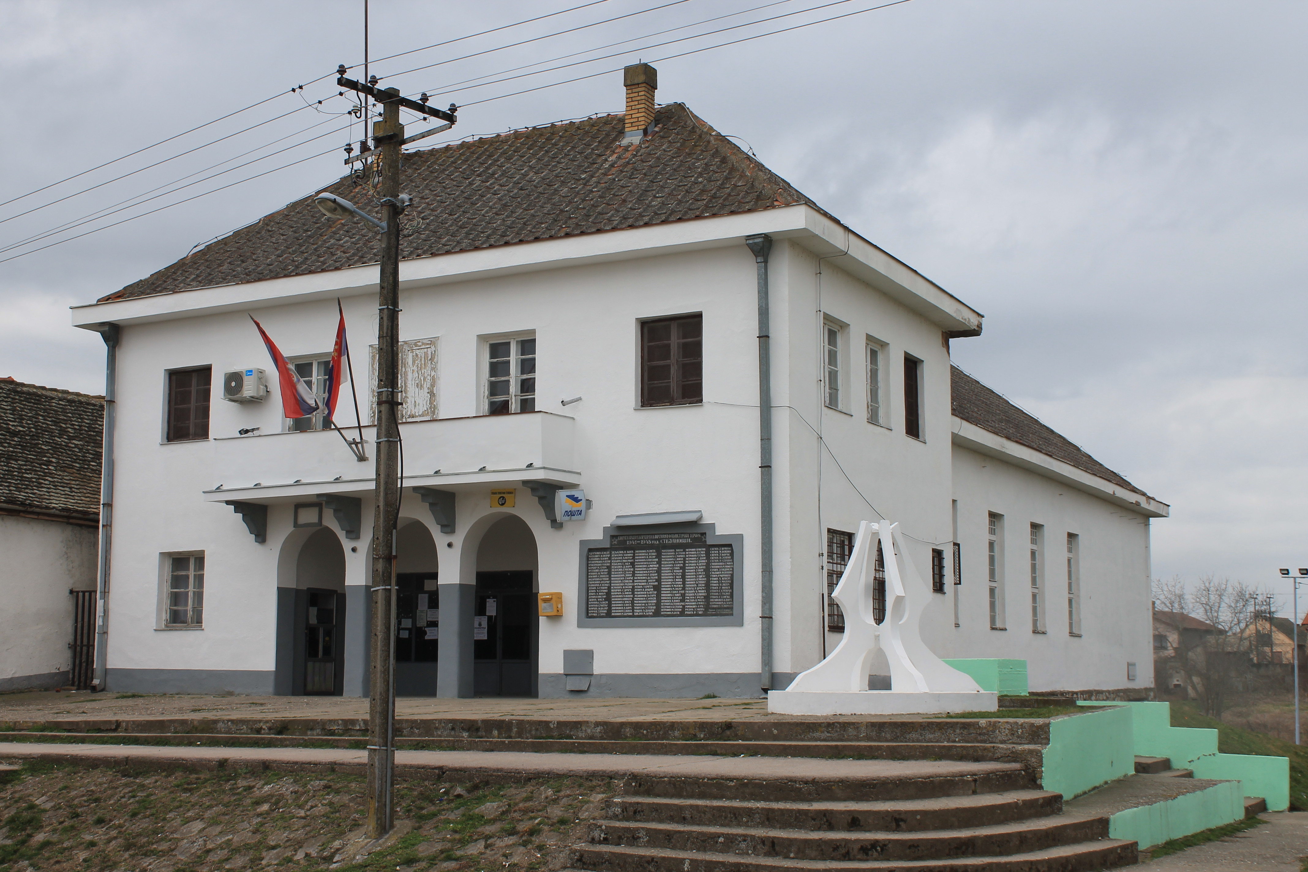 Dom kulture